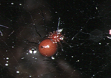 male Nematogmus sanguinolentus from Okinawa.